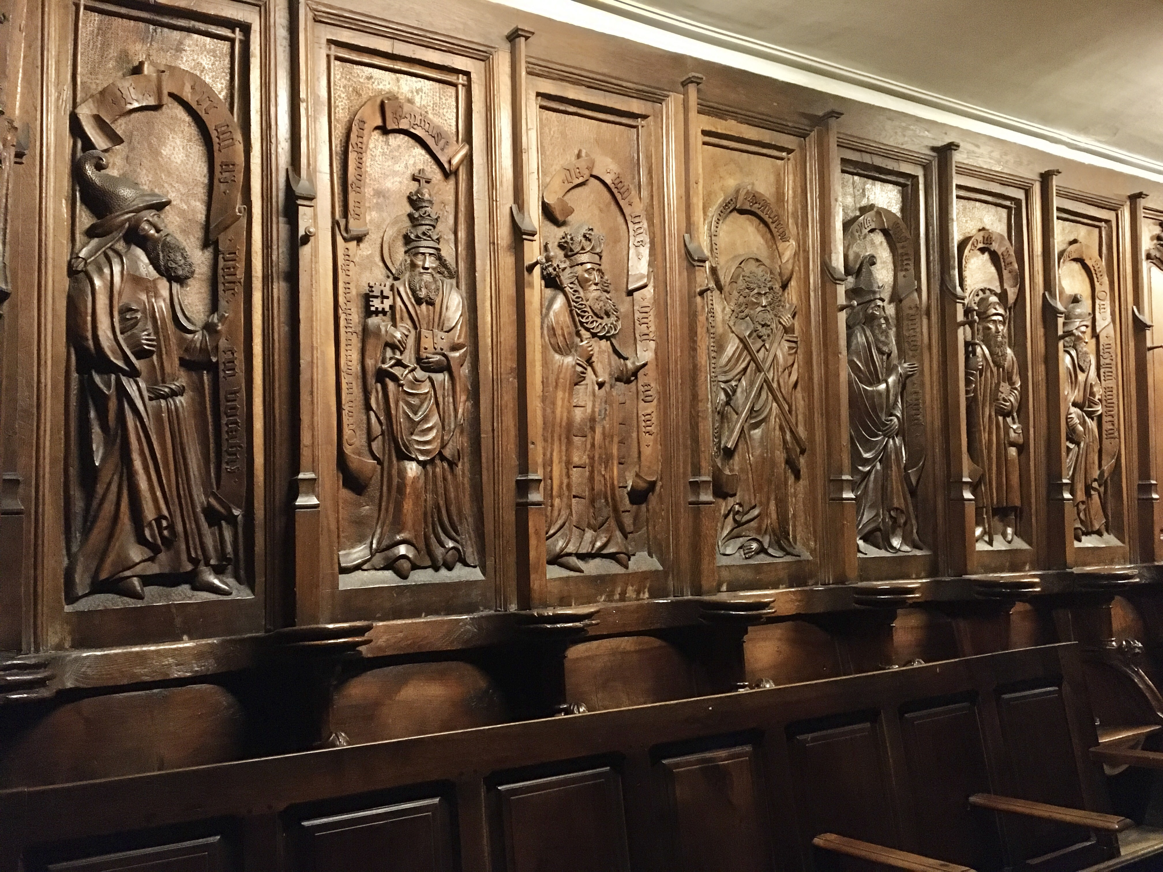 Sept des 14 stalles encore existantes au temple d'Yverdon-les-Bains